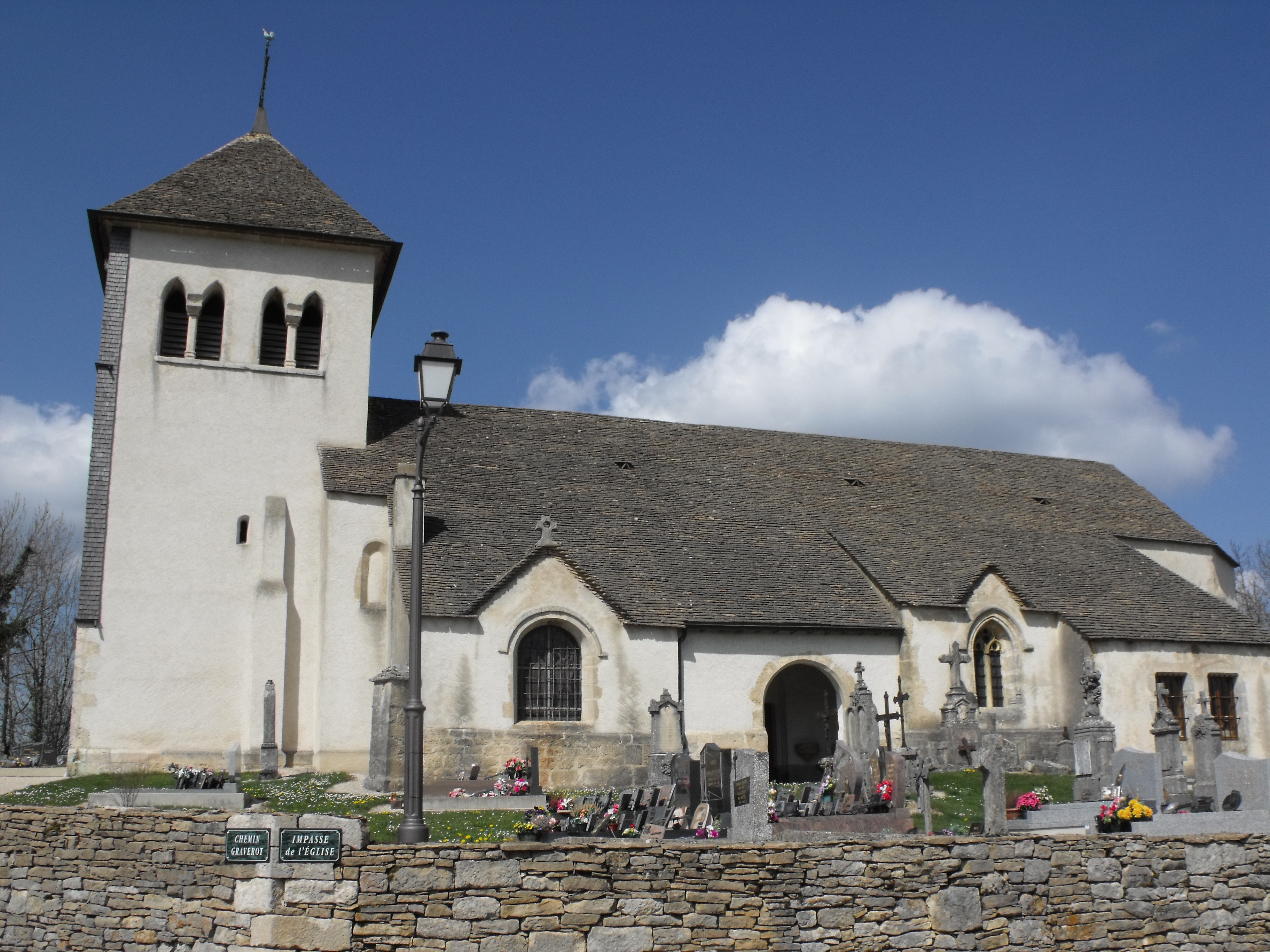 Église Saint-Léger de Chaux-lès-Châtillon